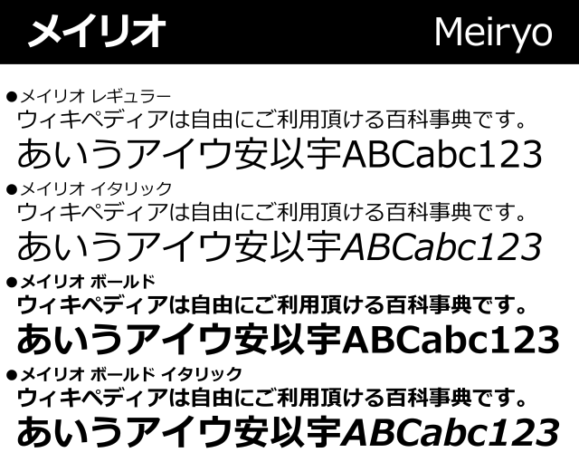 Meiryo(メイリオ) Sample